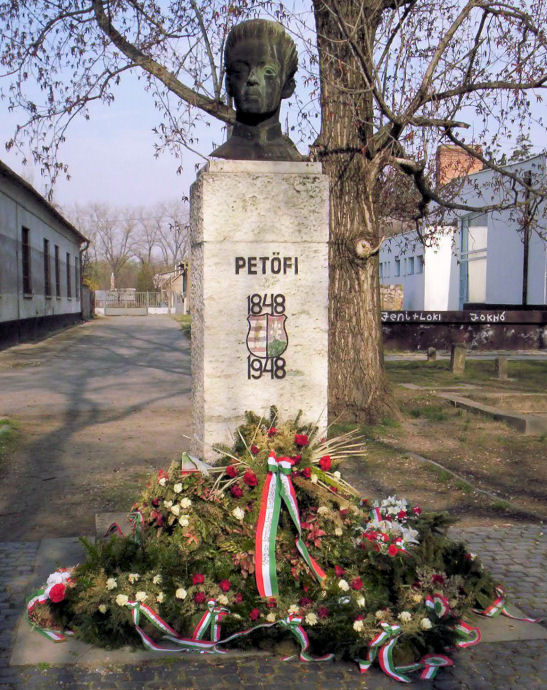 Petőfi Sándor szobra (Szandai Sándor, 1948) Dunavecsén Zrínyi utca 2-6. a Petőfi általános iskola előtt.(Bács-Kiskun megye, Magyarország)